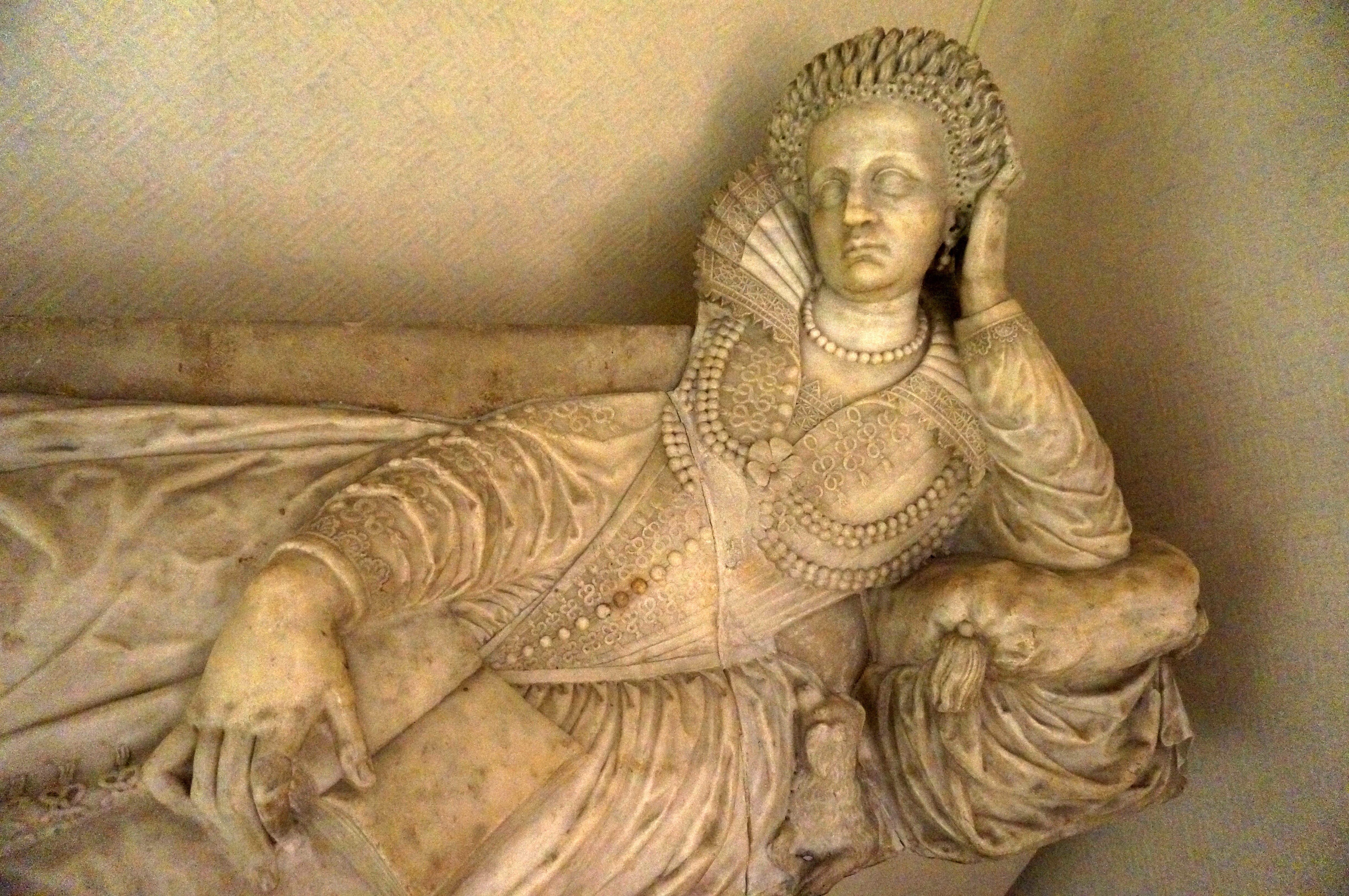 présenté au Musée d'art et d'archéologie de Laon. Sculpture de Mathieu Jacquet vers 1693.